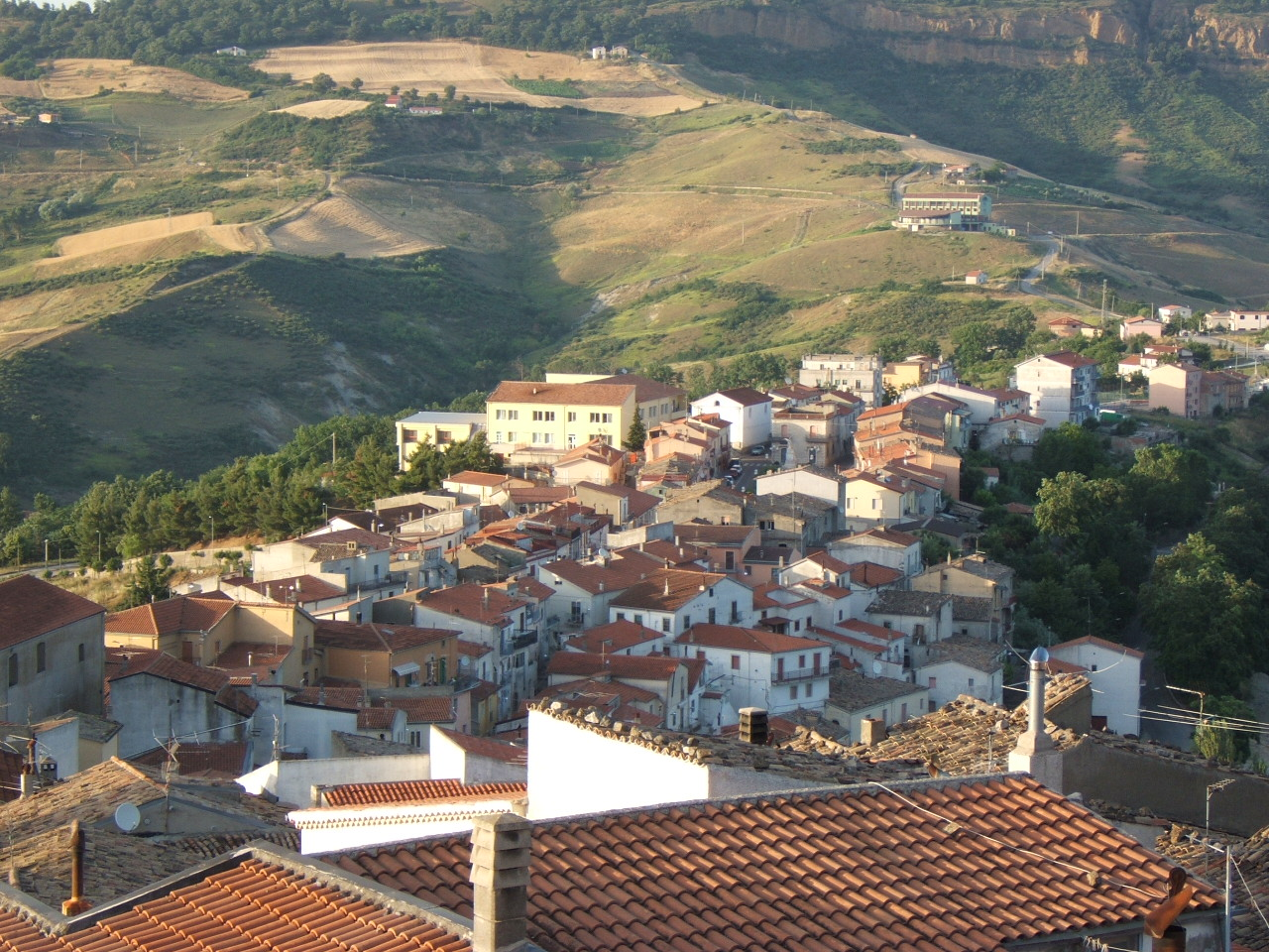 Panorama di Ruvo del Monte dalla corte del Castello